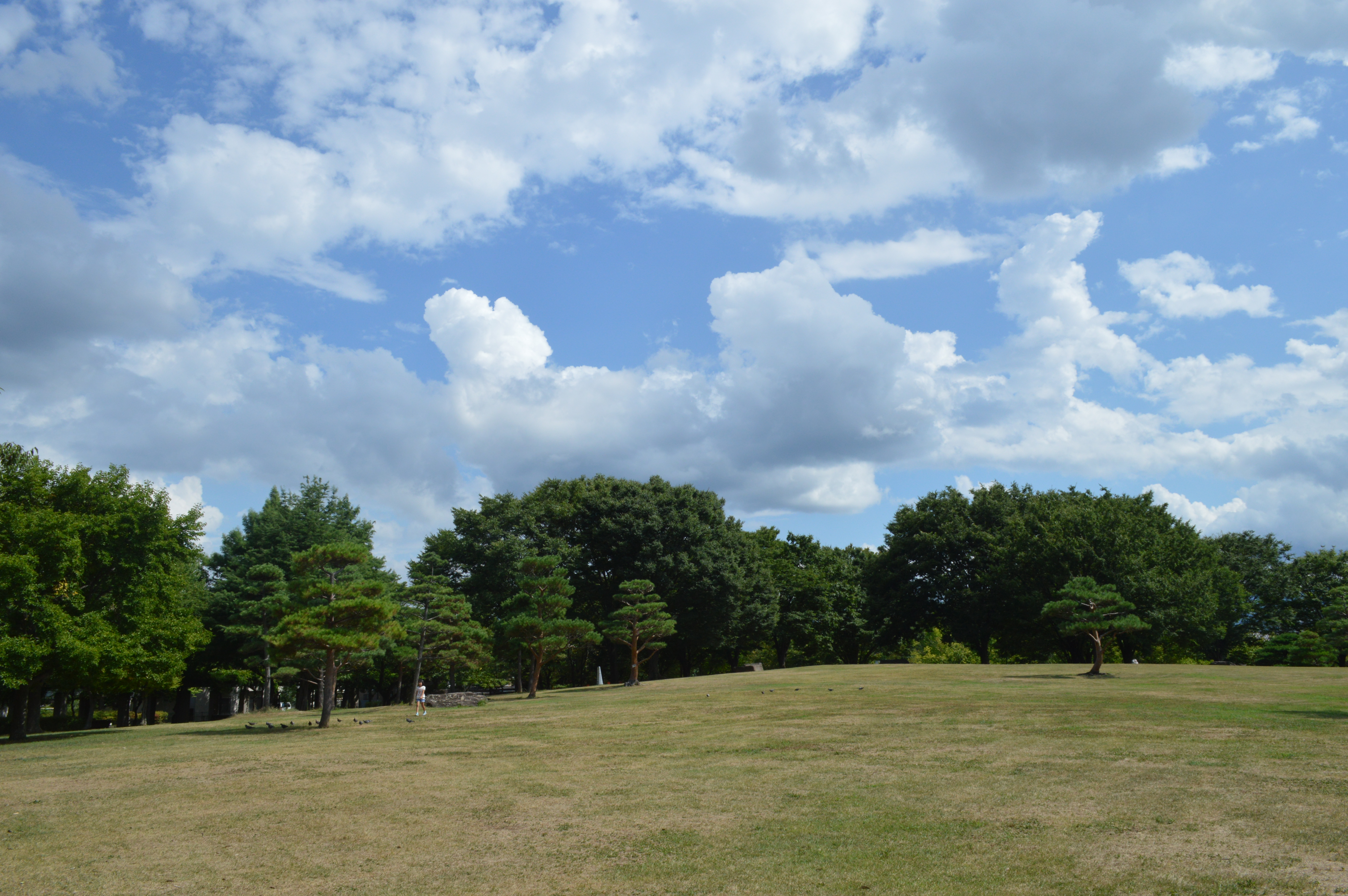 長野市の若里公園。